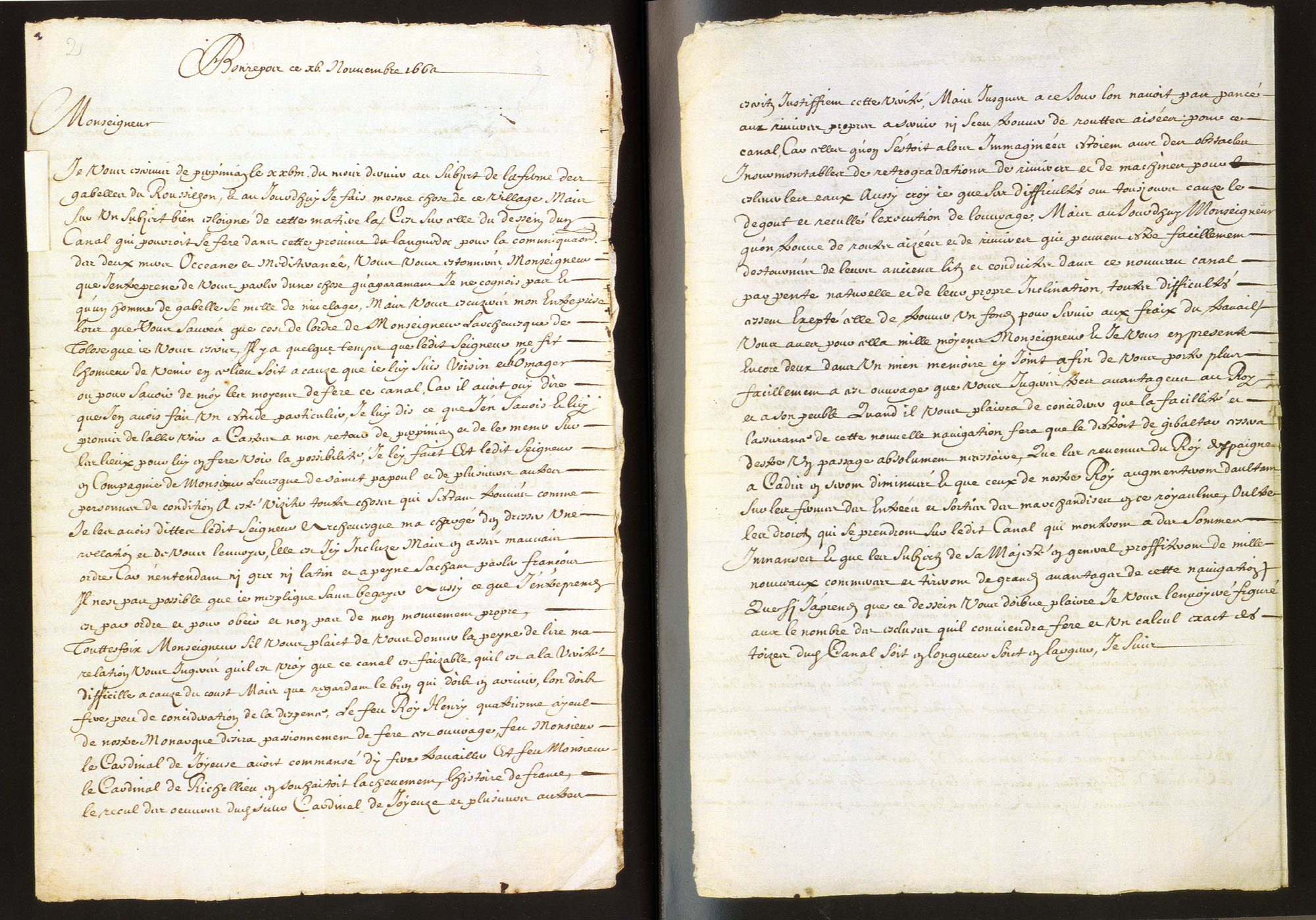 Photo de la lettre de Riquet à Jean-Baptiste Colbert du DU 15 novembre 1662